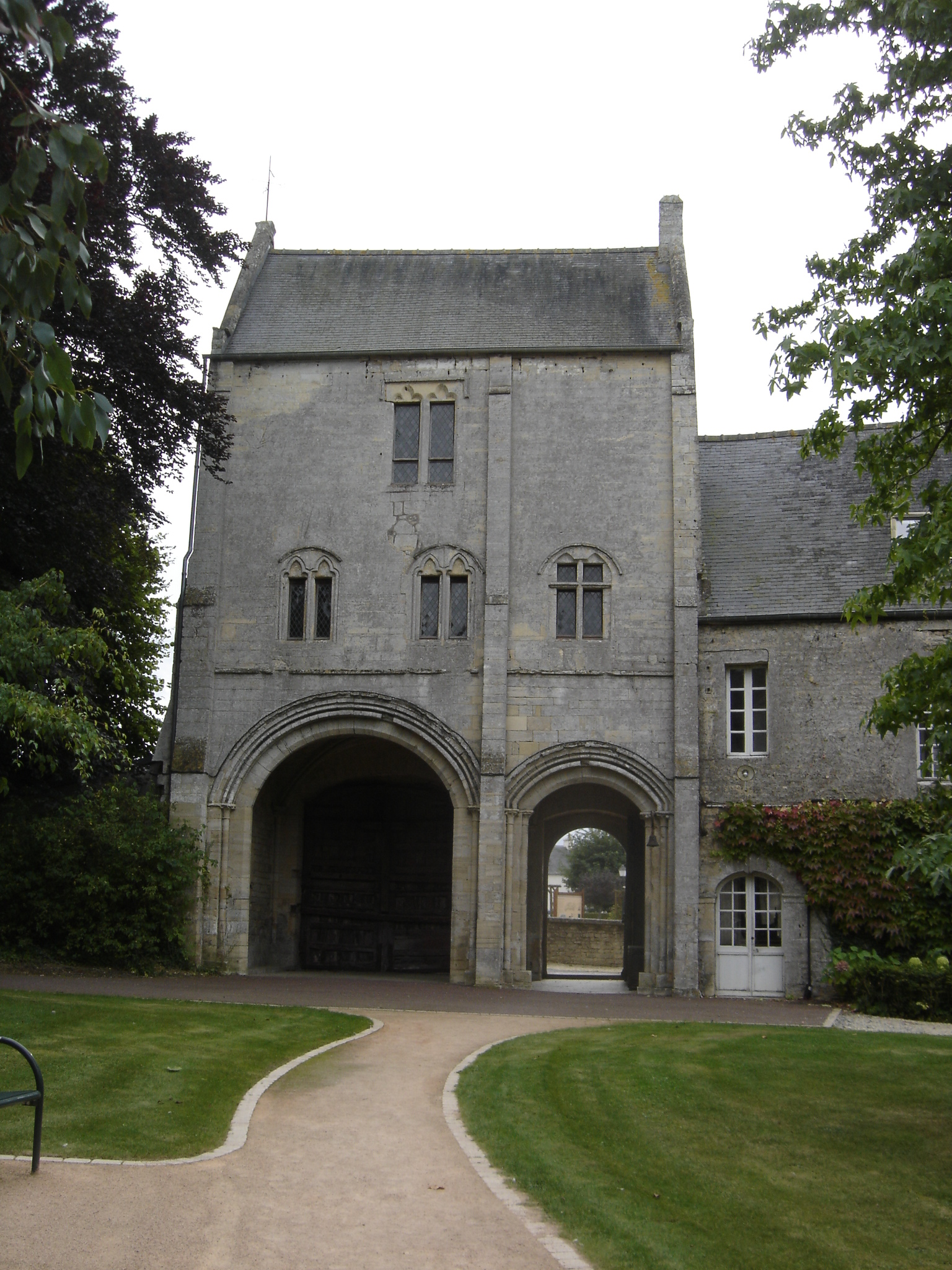 Prieuré de Saint-Vigor-le-Grand, (Classé, 1908) porterie du Prieuré du XIIIè siècle, les portes piétonne et charretière sont surmontées d'archivoltes qui reposent sur des colonnettes surmontées de chapitaux. on voit 2 fenêtres à meneaux